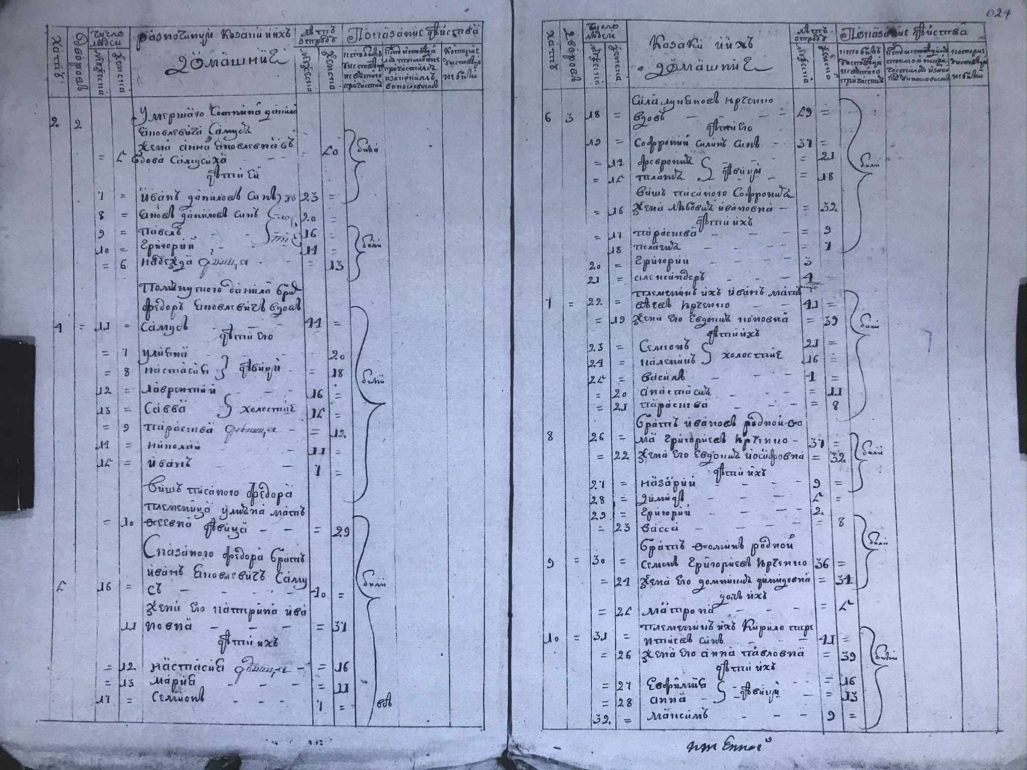 Список козаків села Бурімка 1789 рік.